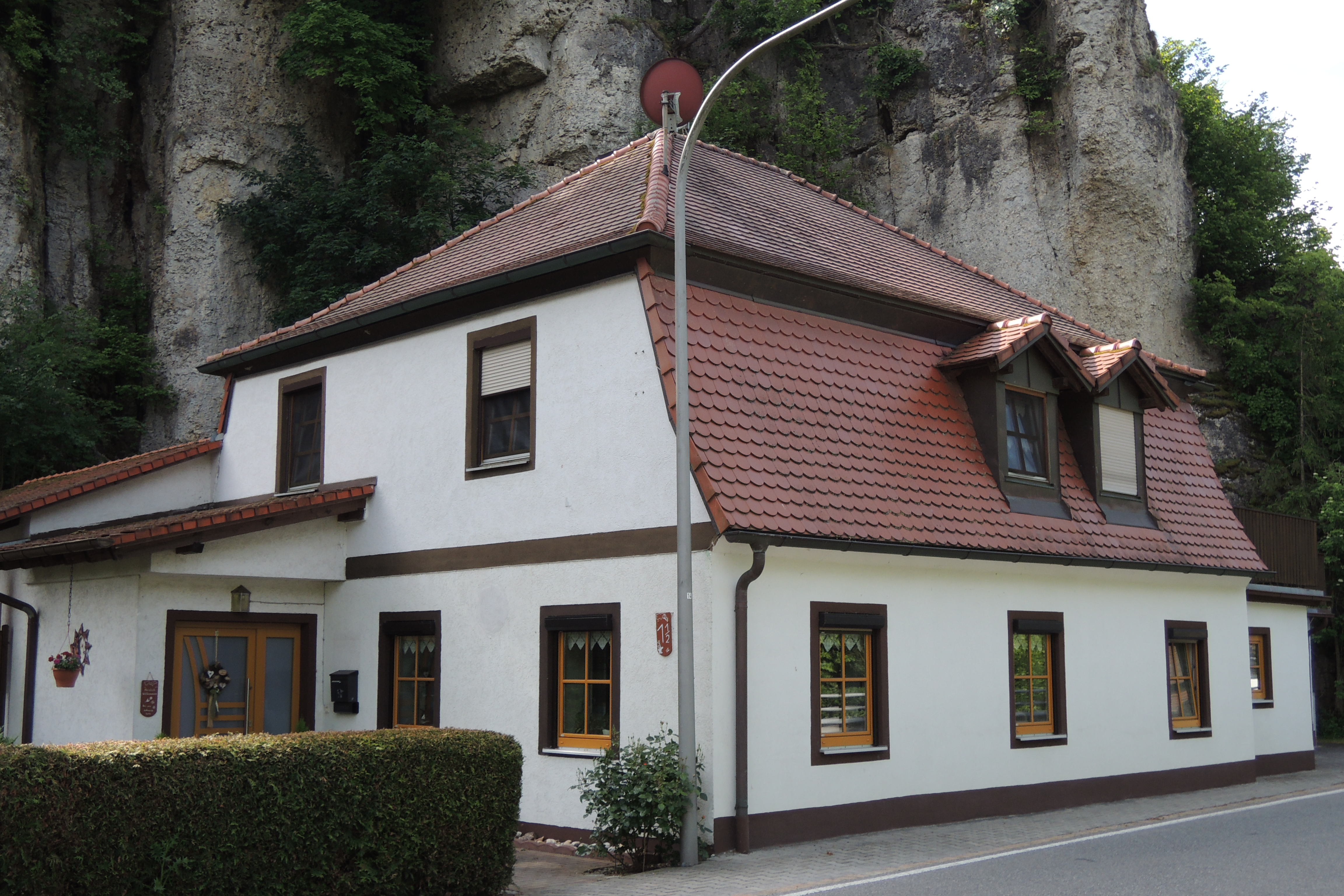 Eingeschossiger und traufständiger Mansarddachbau mit Halbwalm, 18./19. Jahrhundert.